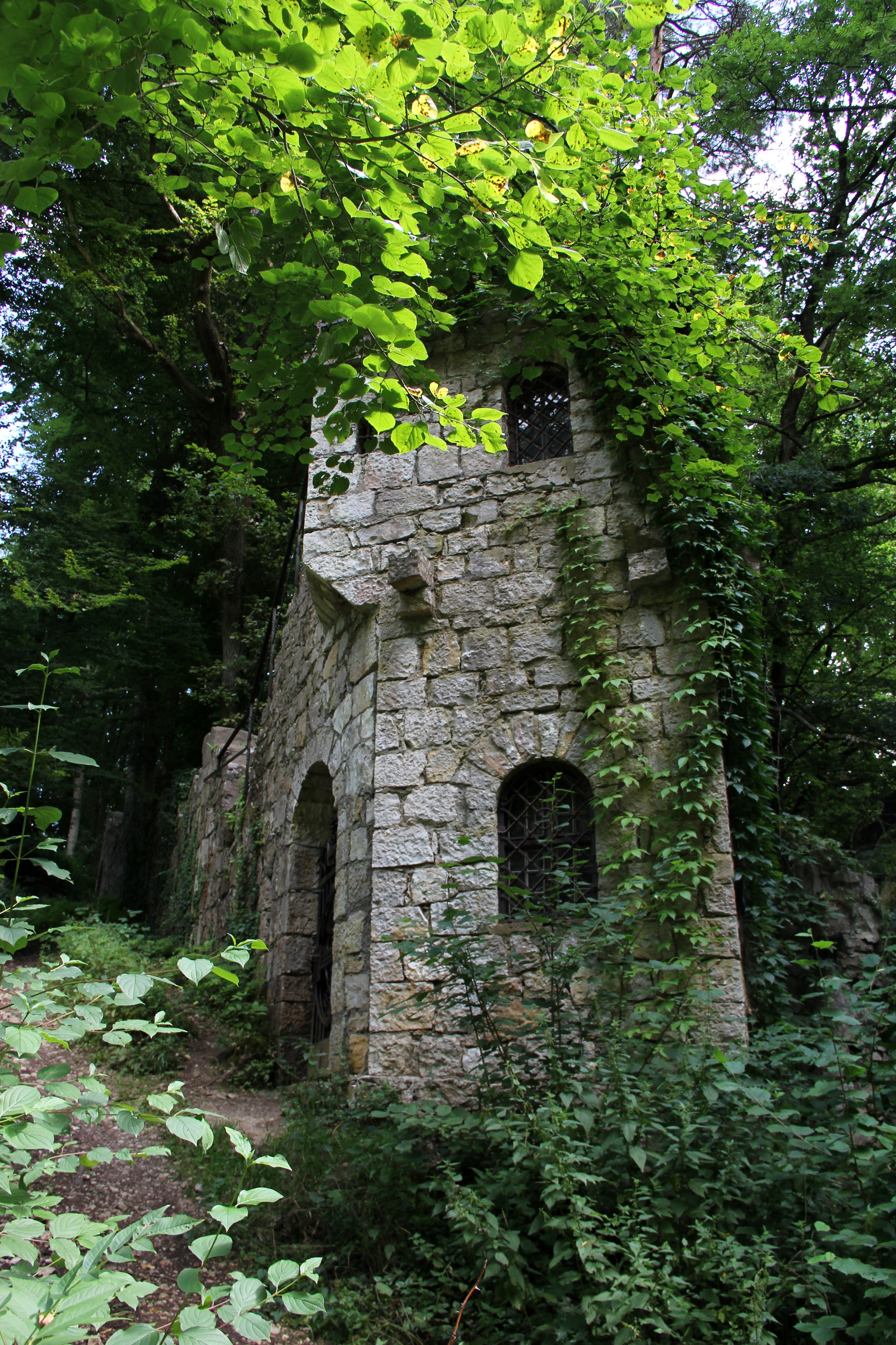 Wengleinspark, Heroldsturm